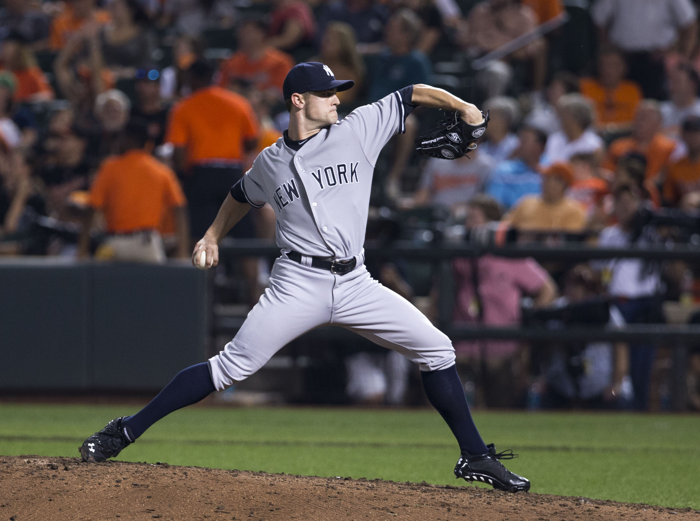 Yankees at Orioles 09/11/13